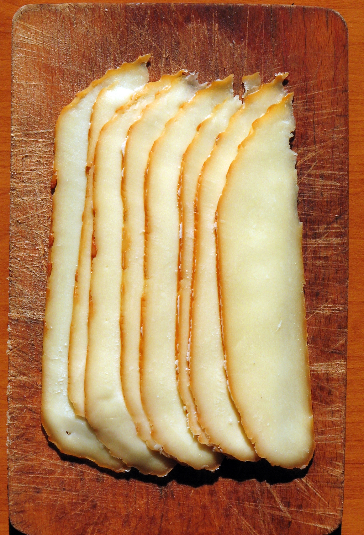 ser wędzony